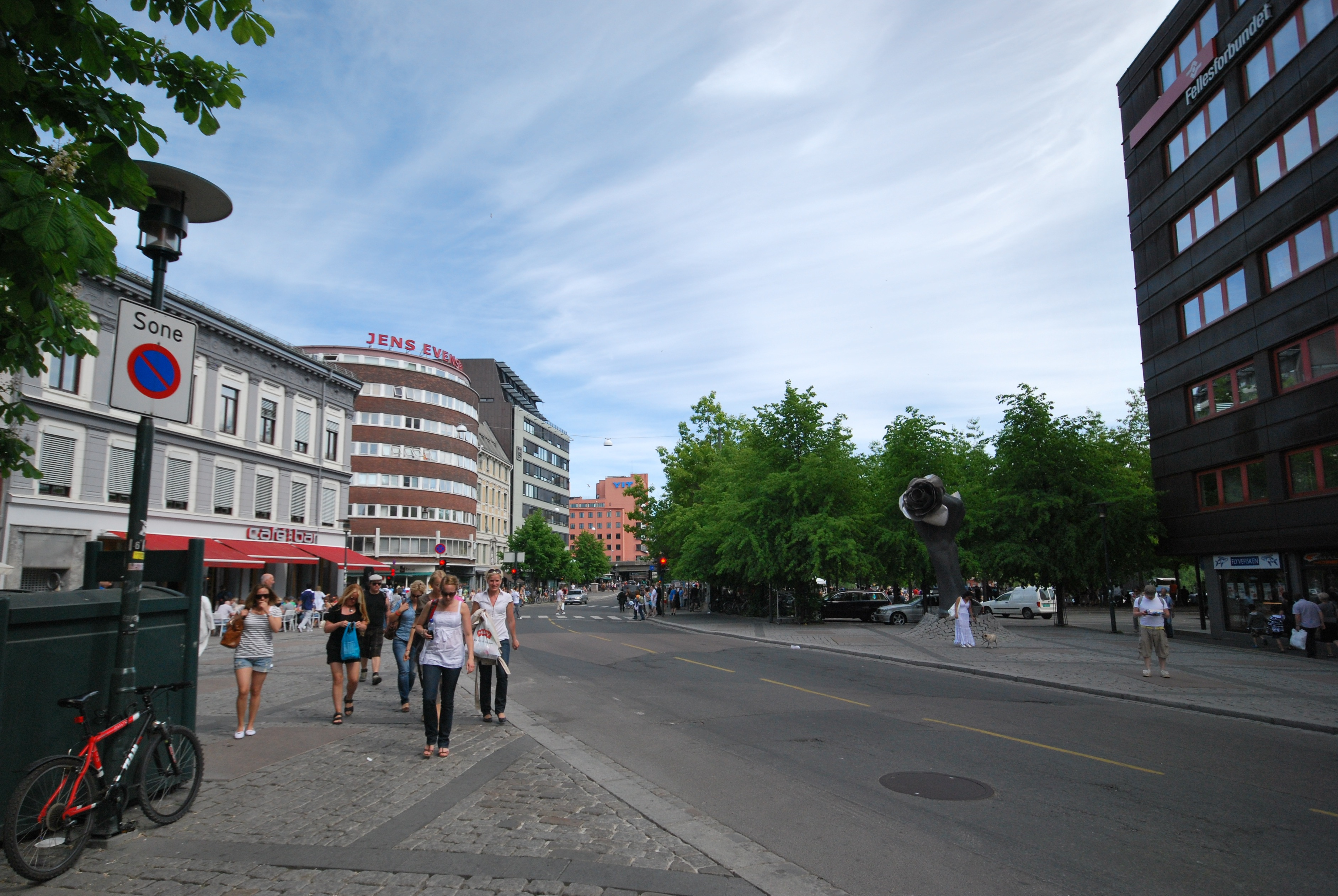 Lilletorget på Vaterland, Oslo, sett fra Stenersgata. Skulpturen «Neve med rose» av Ola Enstad midt i bildet.